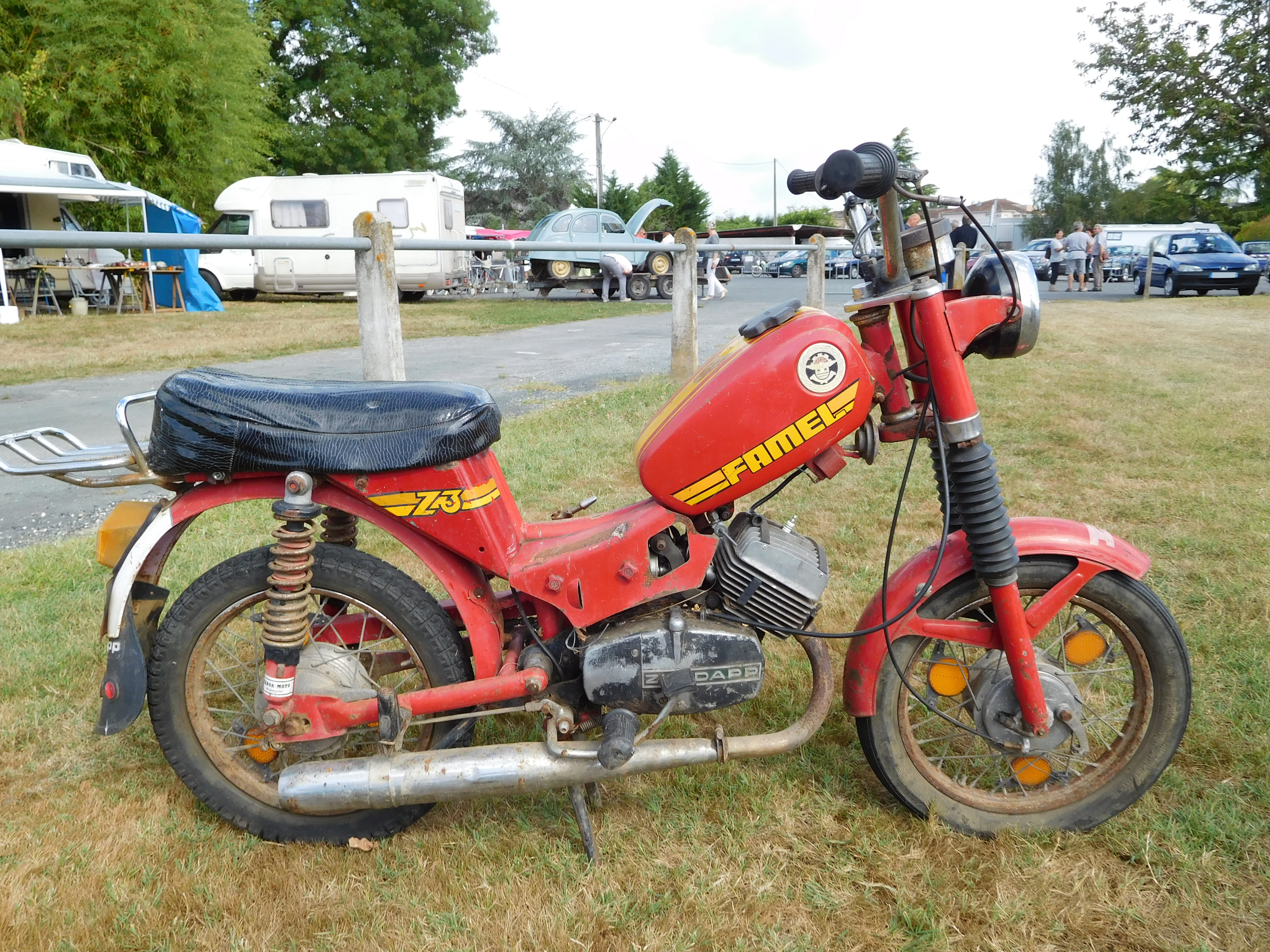 FAMEL Z3.